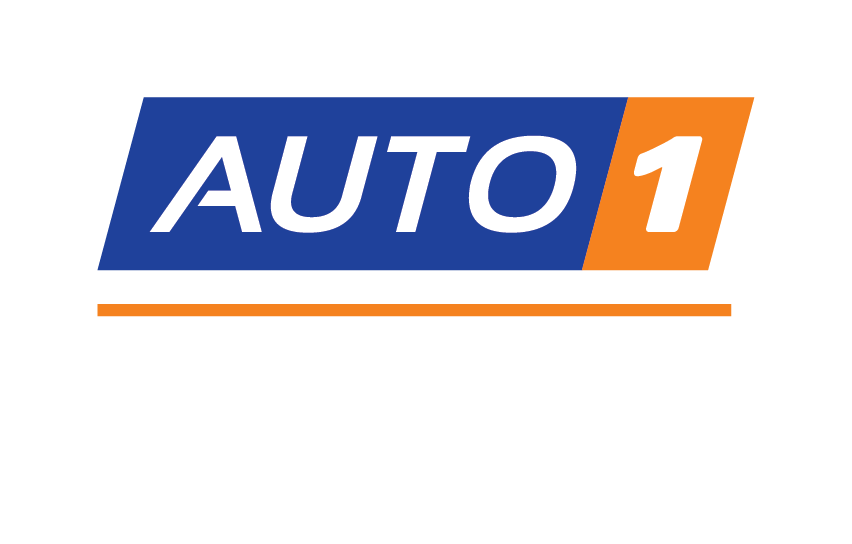 Logo de Auto1 group